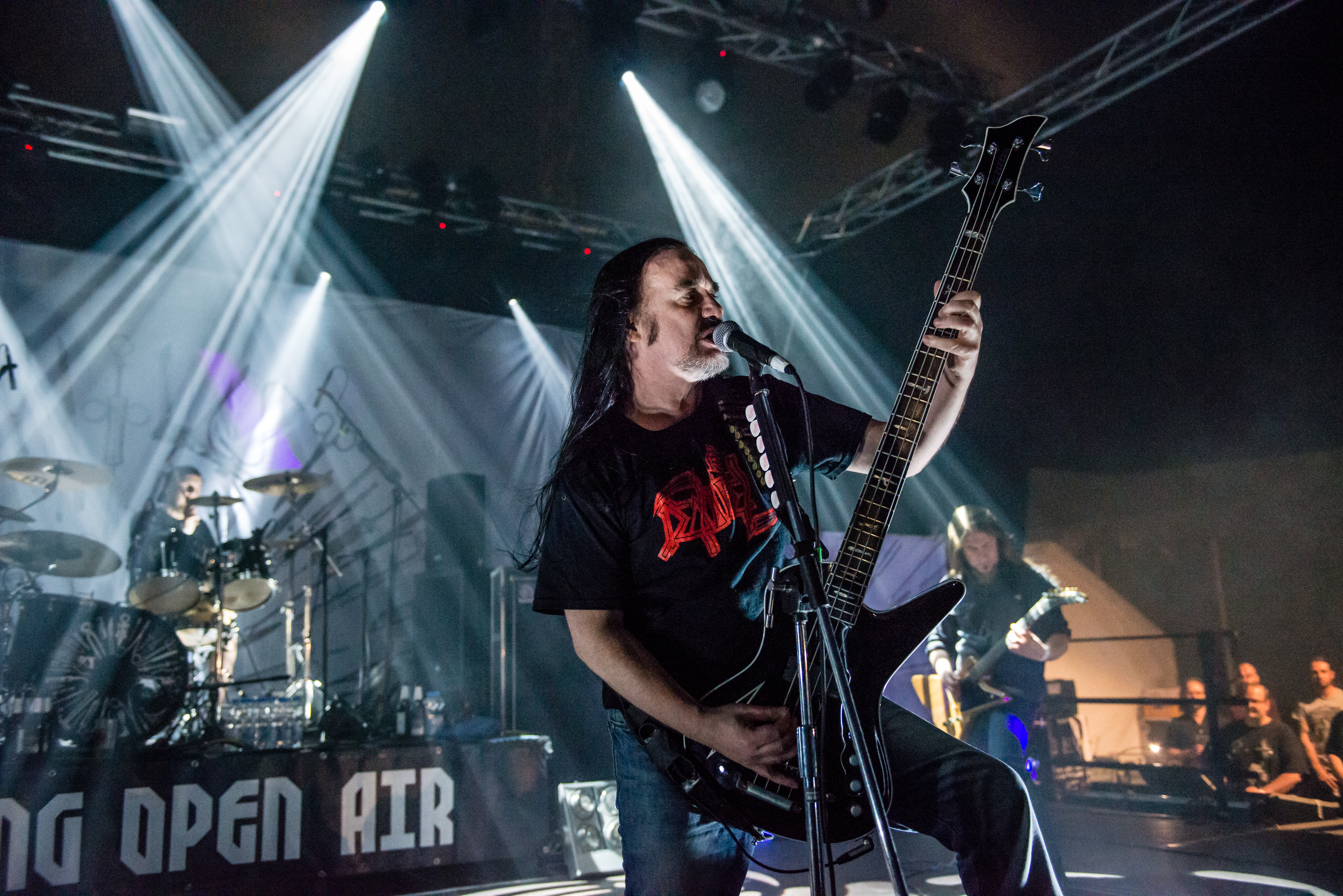 'Dong Open Air 2015; Neukirchen-Vluyn Halde Norddeutschland': 'Carcass'